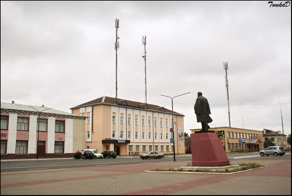 Ельск. Плошча Леніна